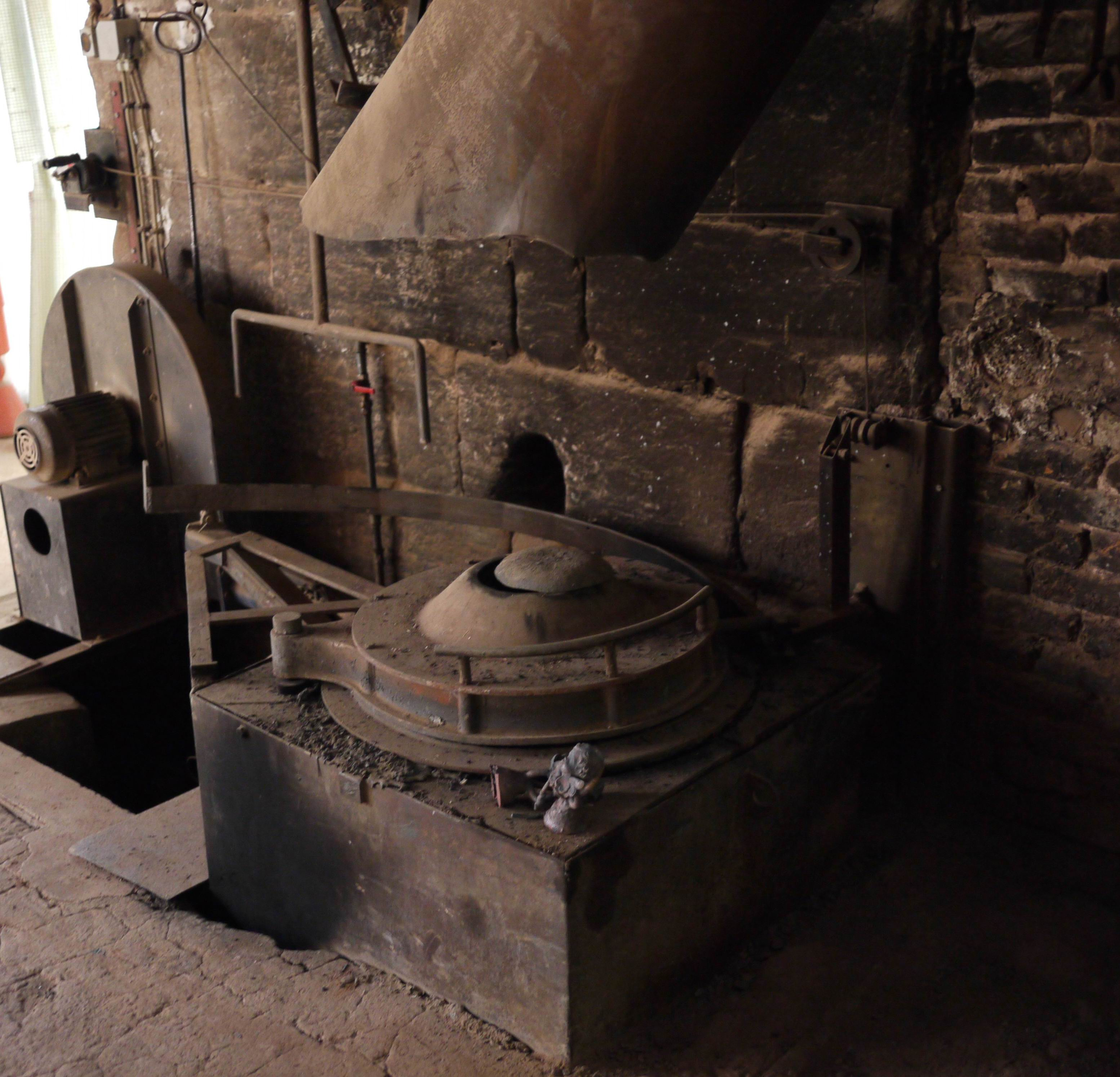 Kunstgießerei Lenz:Schmlezofen